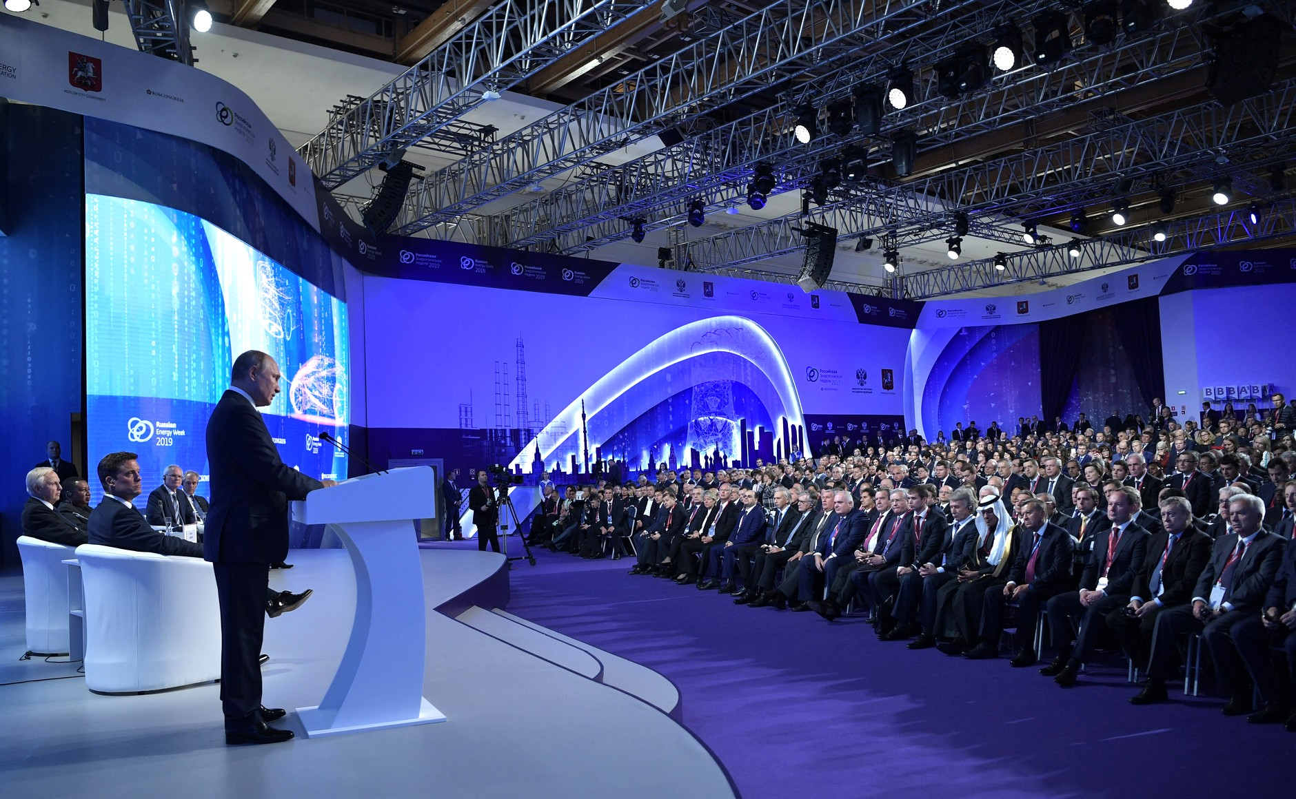 Владимир Путин на пленарном заседании третьего Международного форума «Российская энергетическая неделя»